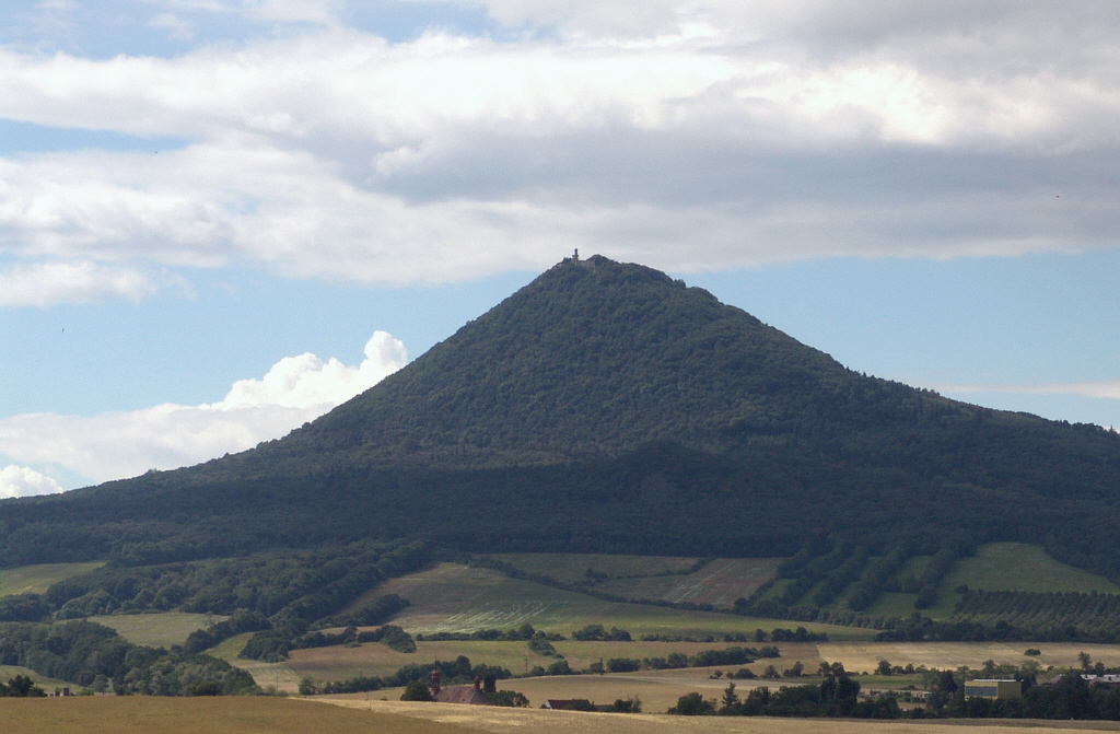 Der Vulkankegel Milleschauer (tschechisch: Milešovka) ist mit 836 Metern die höchste Erhebung im Böhmischen Mittelgebirge (Foto von 2005) Copyright Status: GNU Freie Dokumentationslizenz